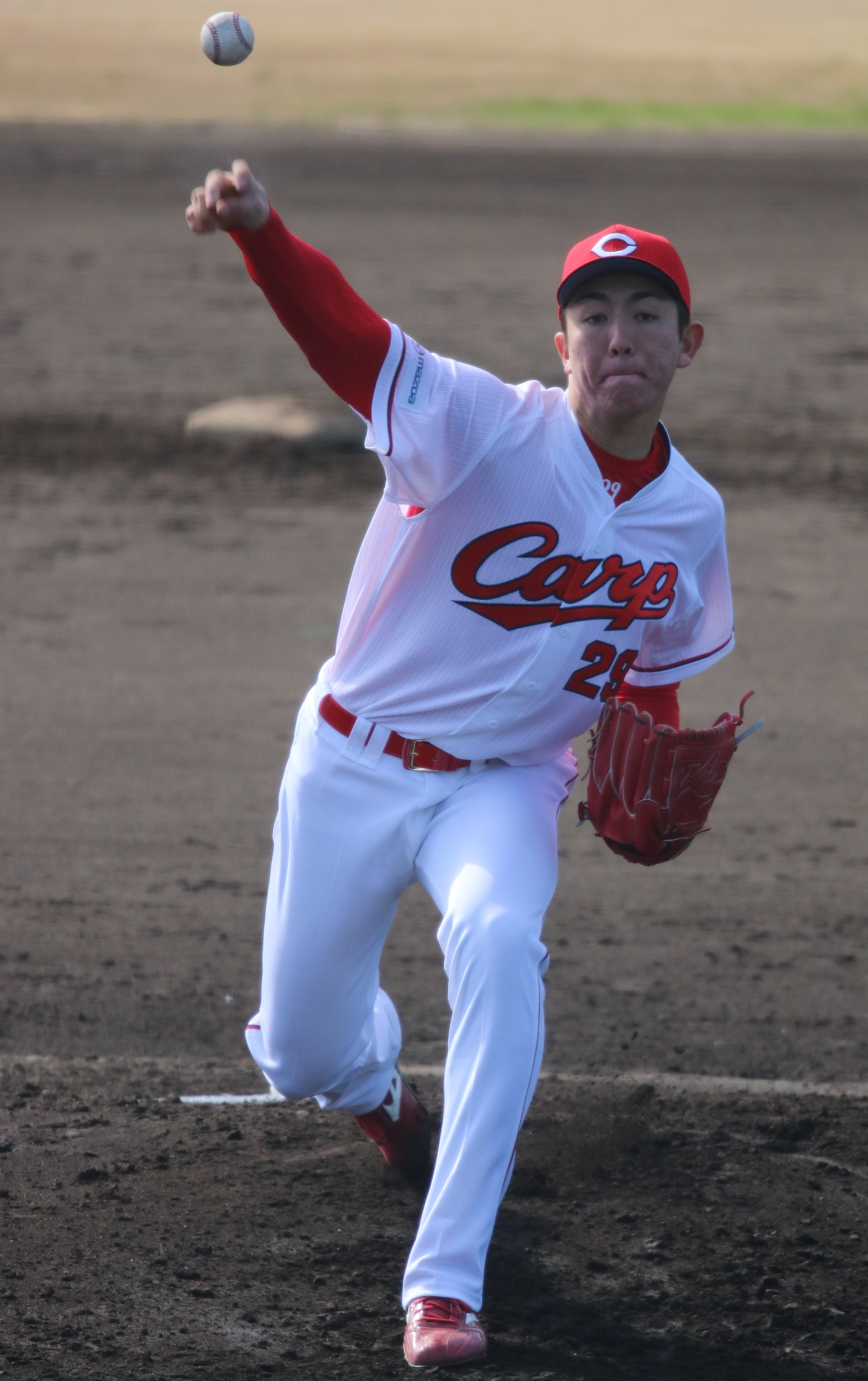 2018/2/8 春季キャンプ(東光寺球場)